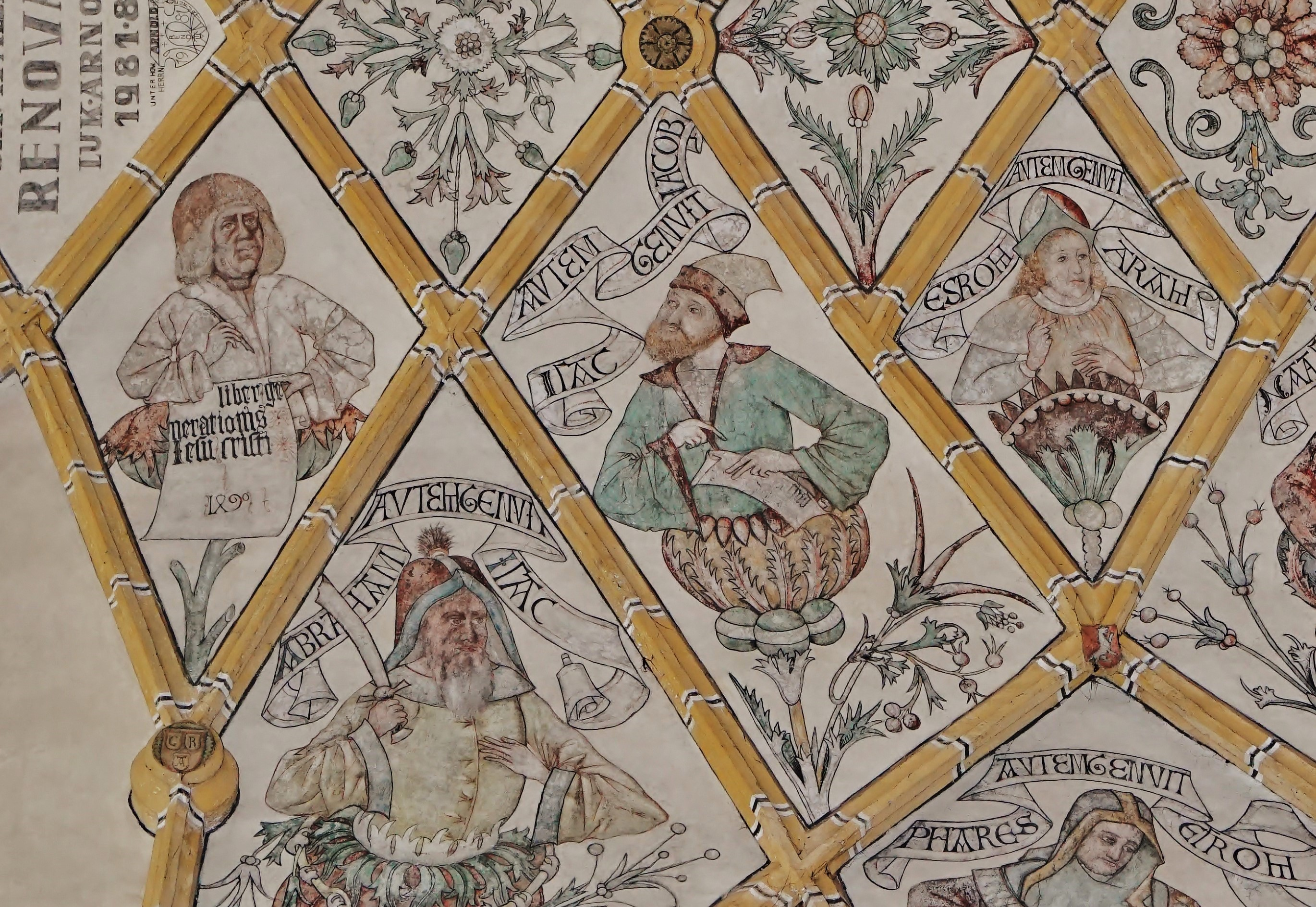 Dom zu Maria Saal, Deckenfresken im Hauptschiff, Ausschnitt